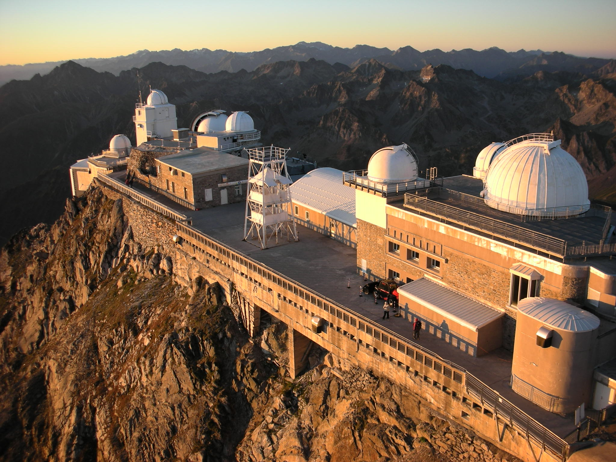 Pic du Midi Observatory (France)